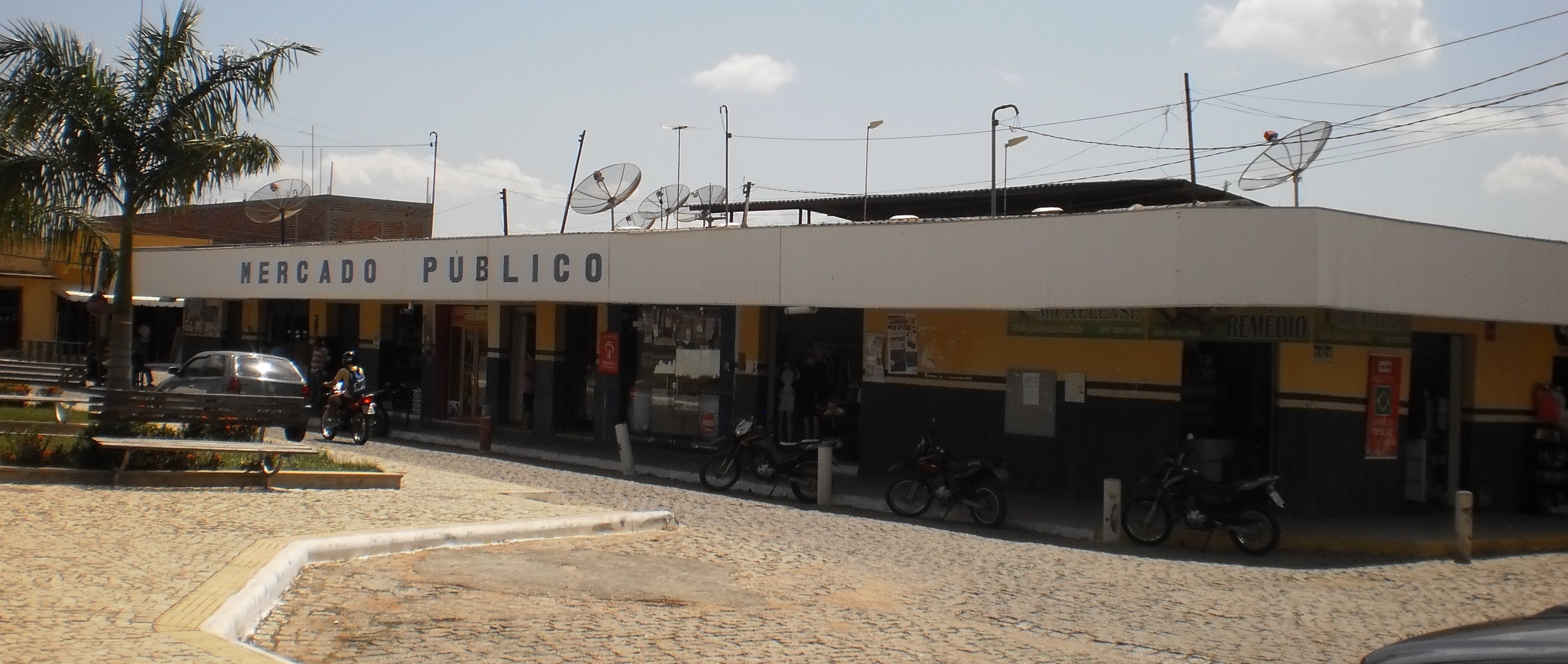 Mercado Público de São Miguel, Rio Grande do Norte, Brasil.